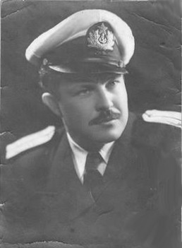 Иван Брньац (Отец Станко Мольнара, фото сделано в 1950 году)